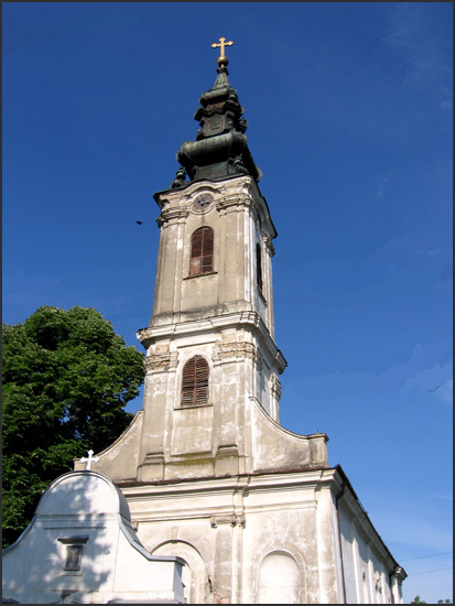 Serbian Orthodox church in Jazak, Vojvodina (Serbia)/L'église orthodoxe serbe de Jazak en Voïvodine (Serbie)